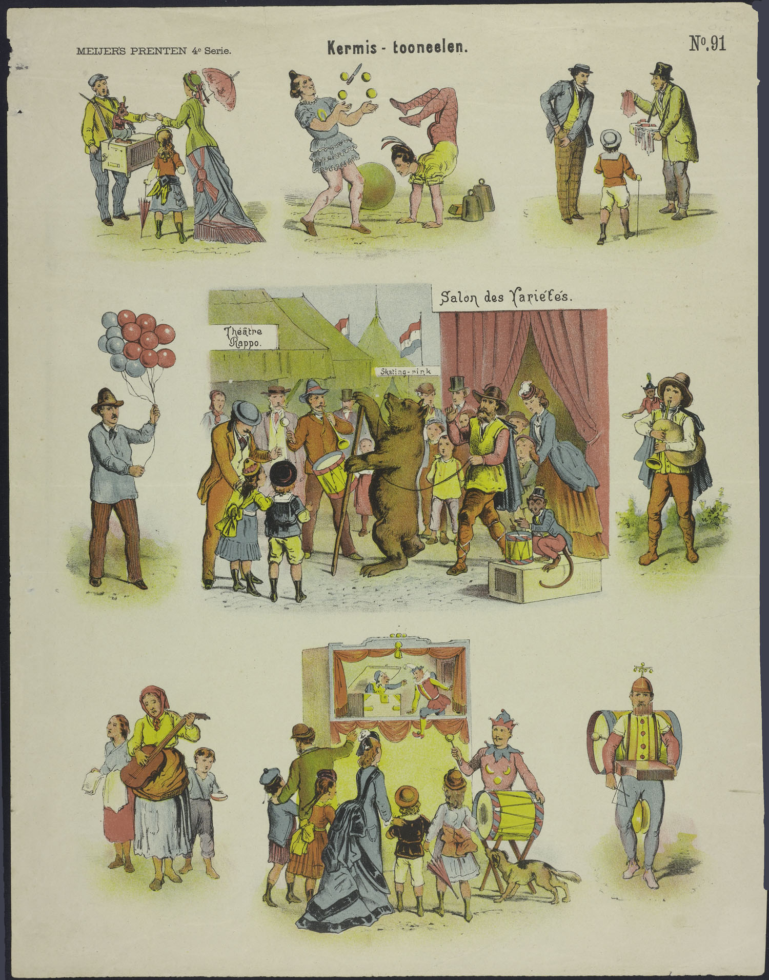 Centsprent met 3 x 3 chromolitho's, met afbeeldingen van: aap, jongleurs, een (joodse) verkoper van linten of loterijbriefjes, ballonnenverkoper, een dansende beer, een doedelzakspeler met aap, een arme vrouw met twee kinderen die een snaarinstrument bespeelt, een Jan Klaassen en Katrijn poppenkast en een éénmansorkest